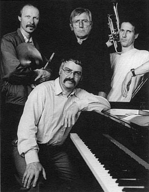 Max E. Keller am Klavier mit Dani Schaffner, Hans Suter und Stefan Wyler in der Produktion NIX HARMONIE, Satire und Sound